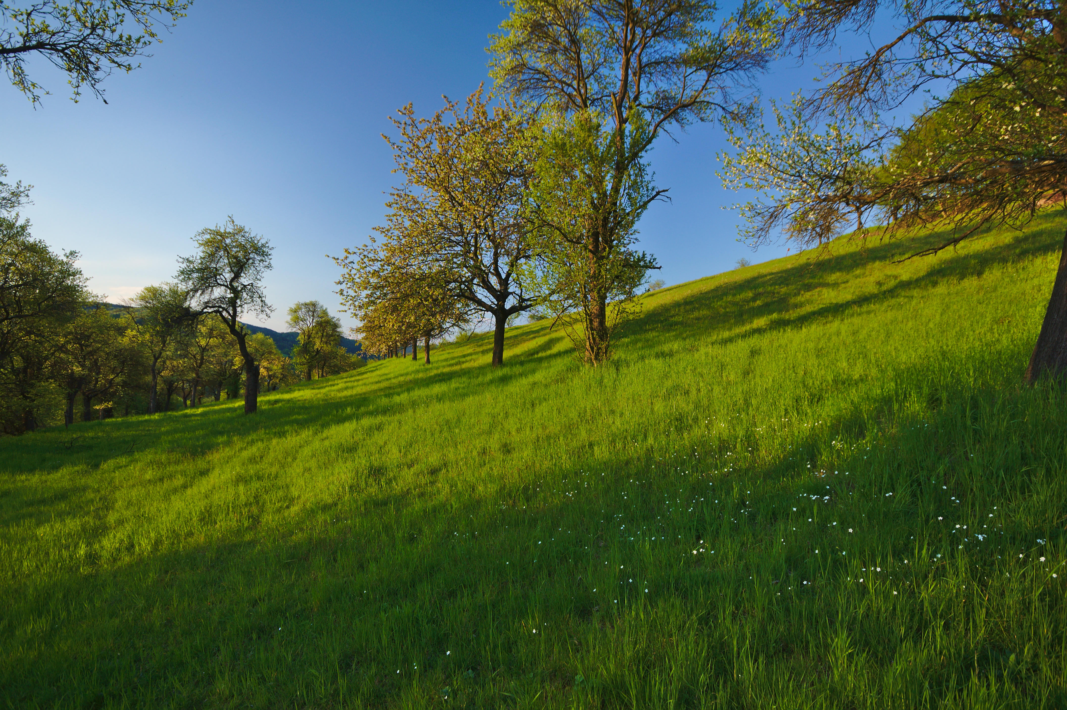 Přírodní památka Nad Koupalištěm, okres Žďár nad Sázavou